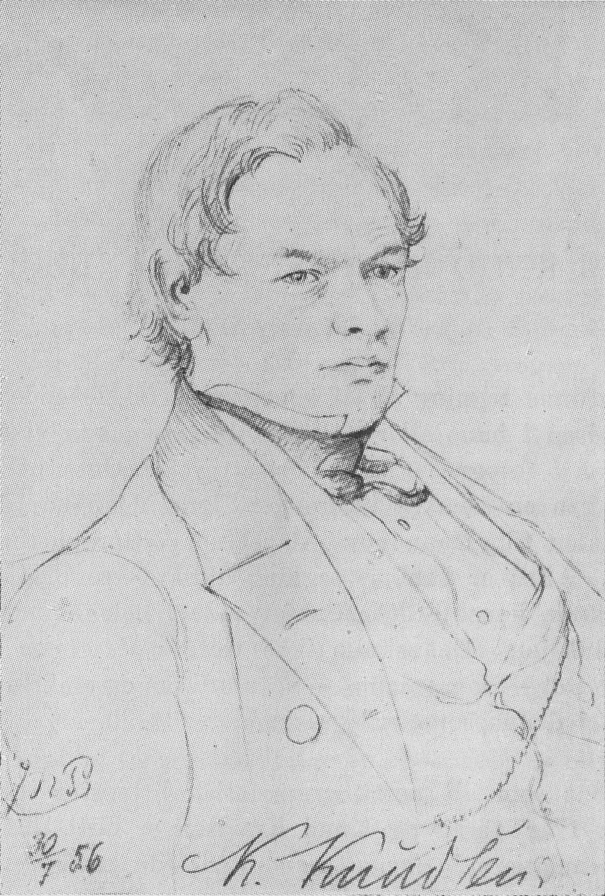 Knud Knudsen tegnet av Jonas Nicolai Prahm (1816–1878)